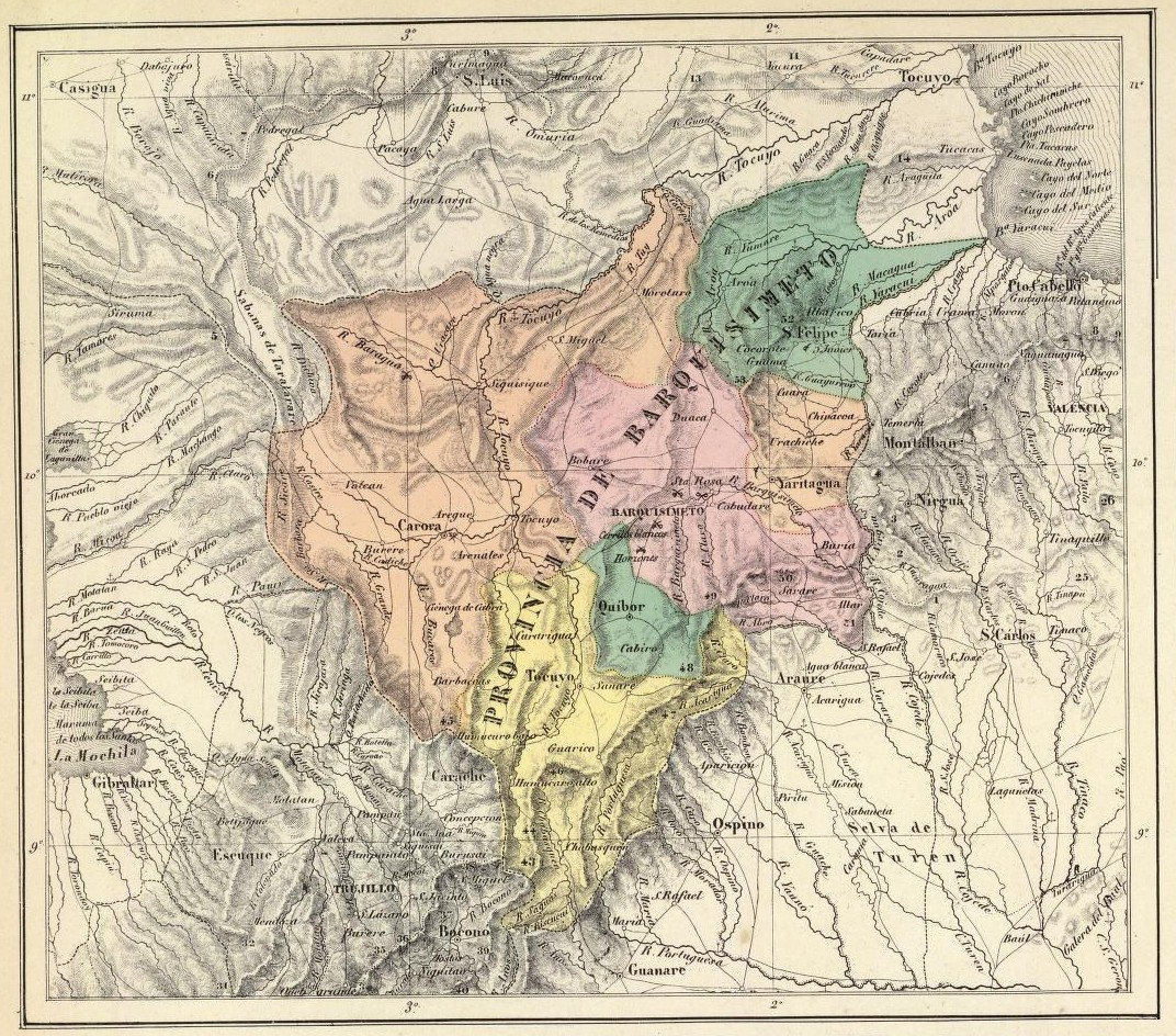 Provincia_Barquisimeto,1840 aparece sarare,buria,altar cuando ese entonce pertecian al departamento de barquisimeto(hoy municipio Iribarren)